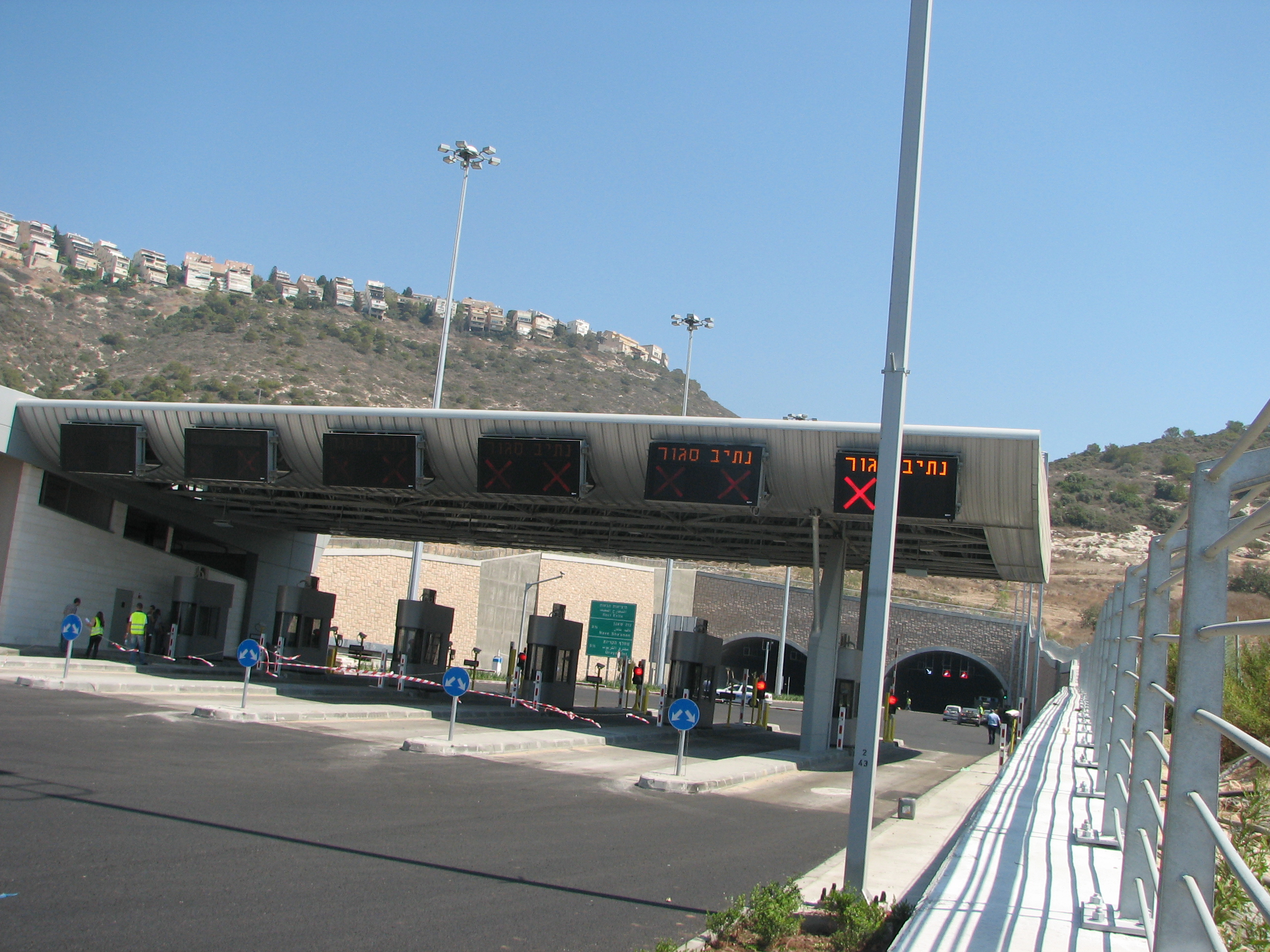 West entrance of Carmel Tunnels in Haifa, Israel. Cfar Samir entrance כניסה למערות הכרמל מצד מערב , מכפר סמיר. הכניסה נחצבה במקום בו שכנה בעבר העיר קסטרא